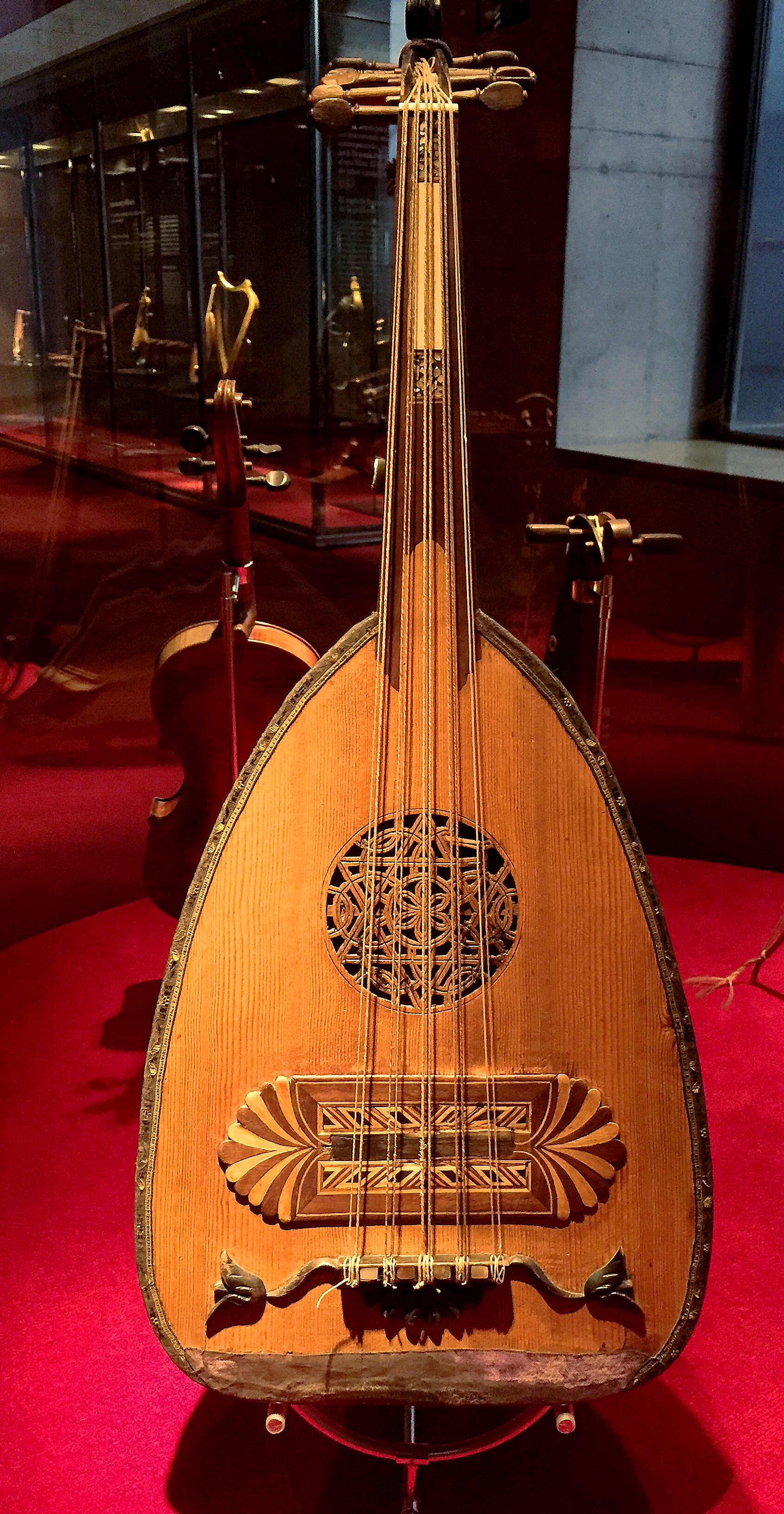 Ud, segle XIX, Magrib, fons del Museu de la Música de Barcelona. Oud, XIXth, Magreb